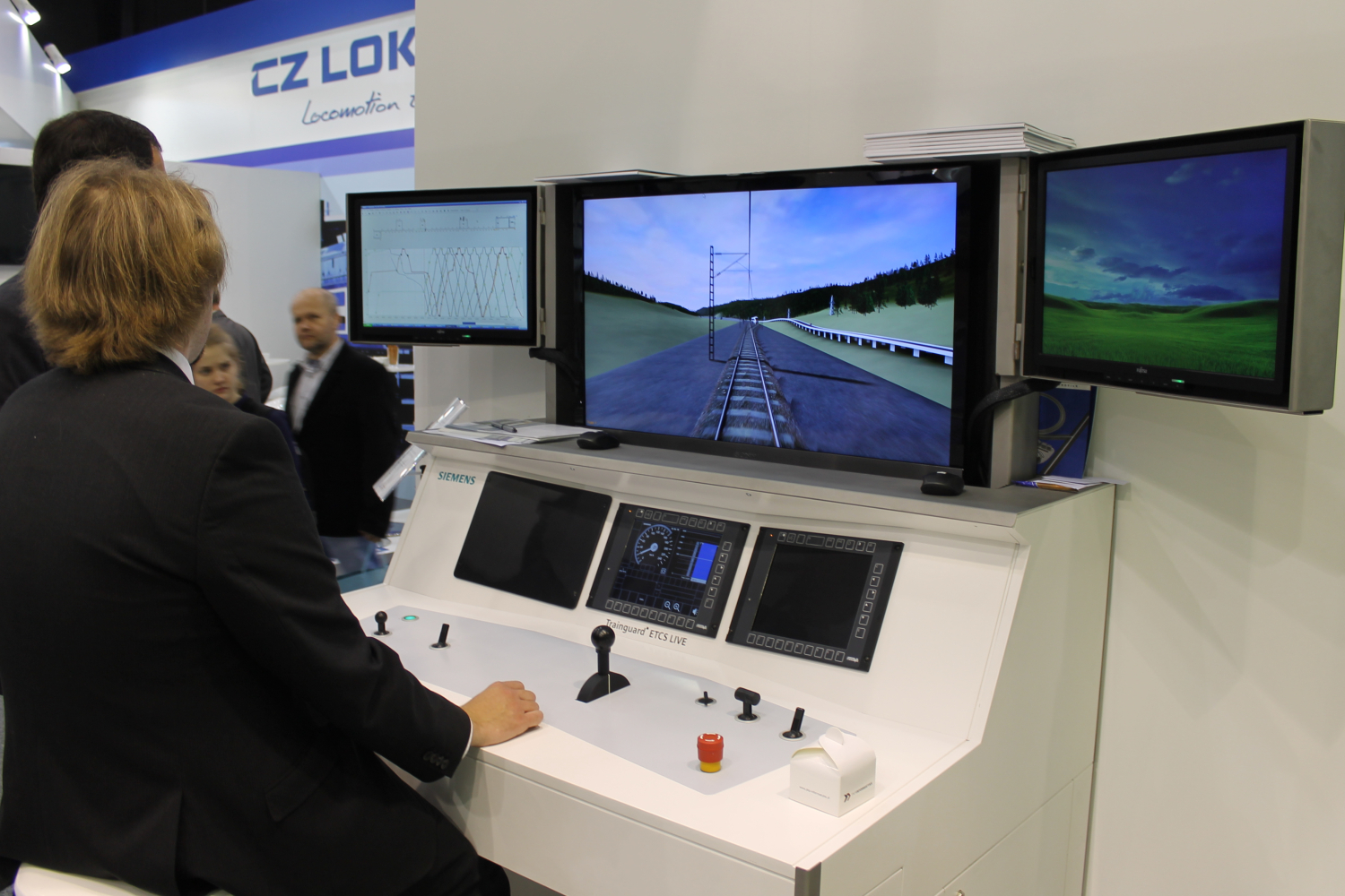 Symulator prezentowany na stoisku Siemensa podczas targów Trako 2015. The making of this document was supported by Wikimedia Polska Association, within Wikigrant no. WG 2015-34. English | polski | +/−